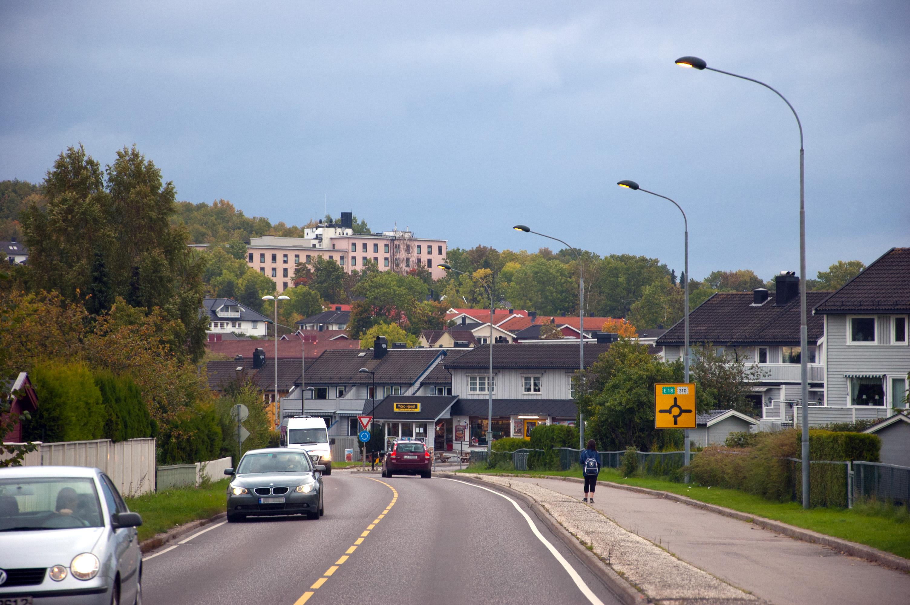 Fylkesvei 705 Holtanveien i Horten, Vestfold. I bakgrunnen er Horten Sykehus.